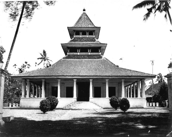 Foto. Album beslaat souvenir foto's van Java. Javaanse Misfigit